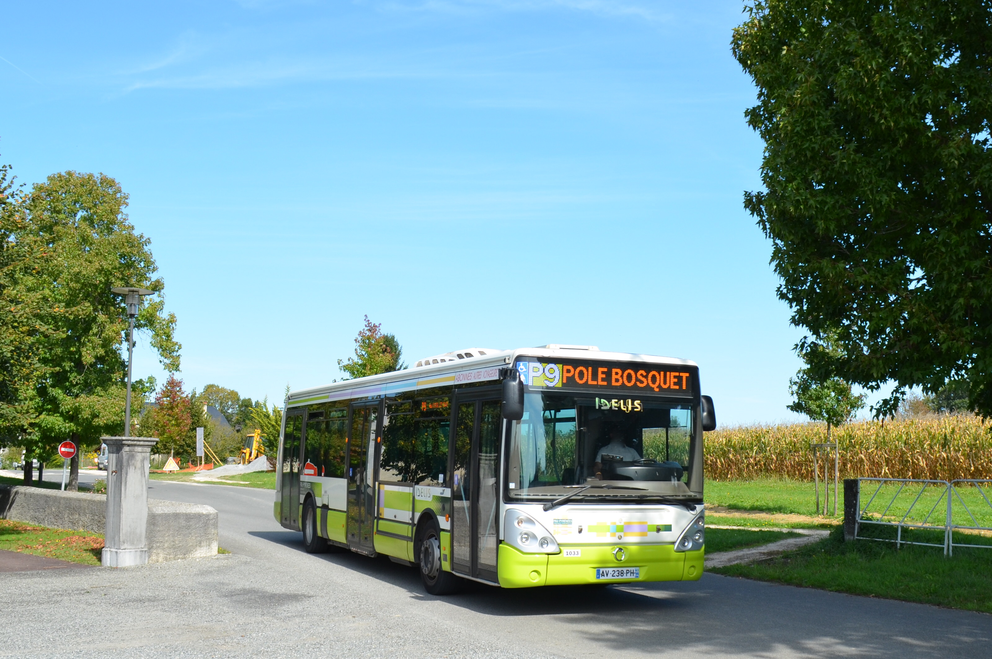 Ligne P9 du réseau Idelis de Pau.